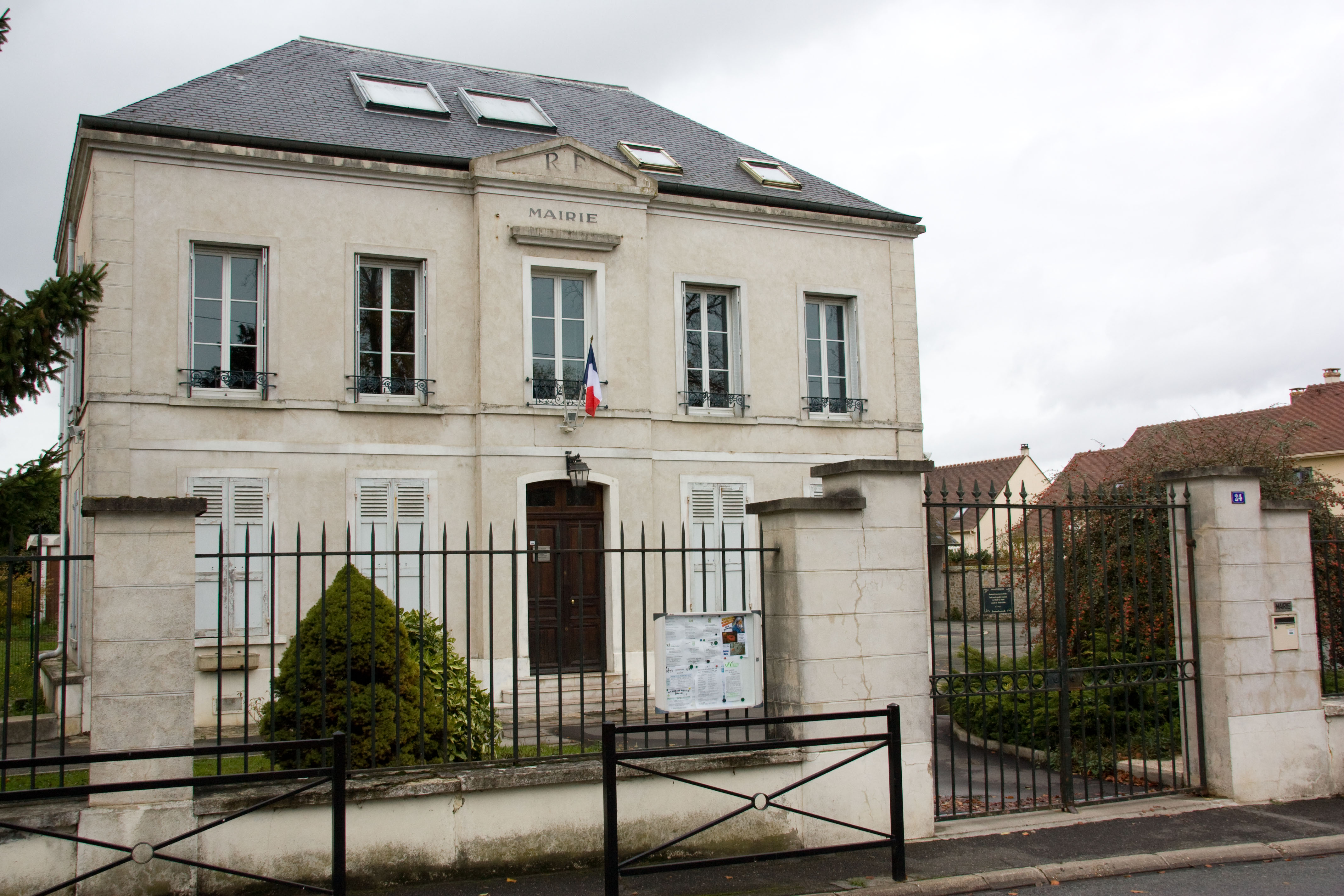 Mairie d'Écharcon. Écharcon. Essonne. France.